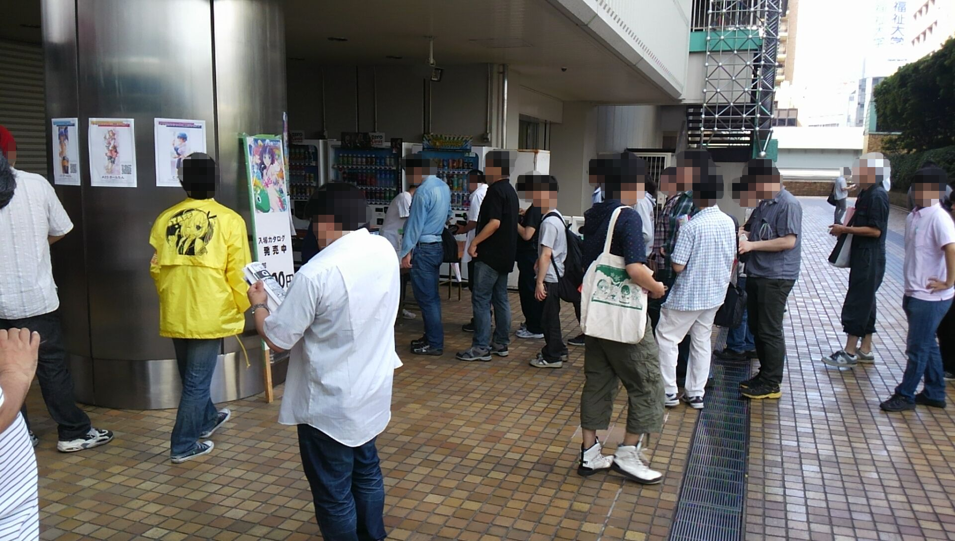 サンシャインクリエイション60の開催場所となった池袋サンシャインシティの入口そばにて行われた、カタログ販売の様子。SC60開催前（2013-06-23 08:46:27/JST）に撮影。